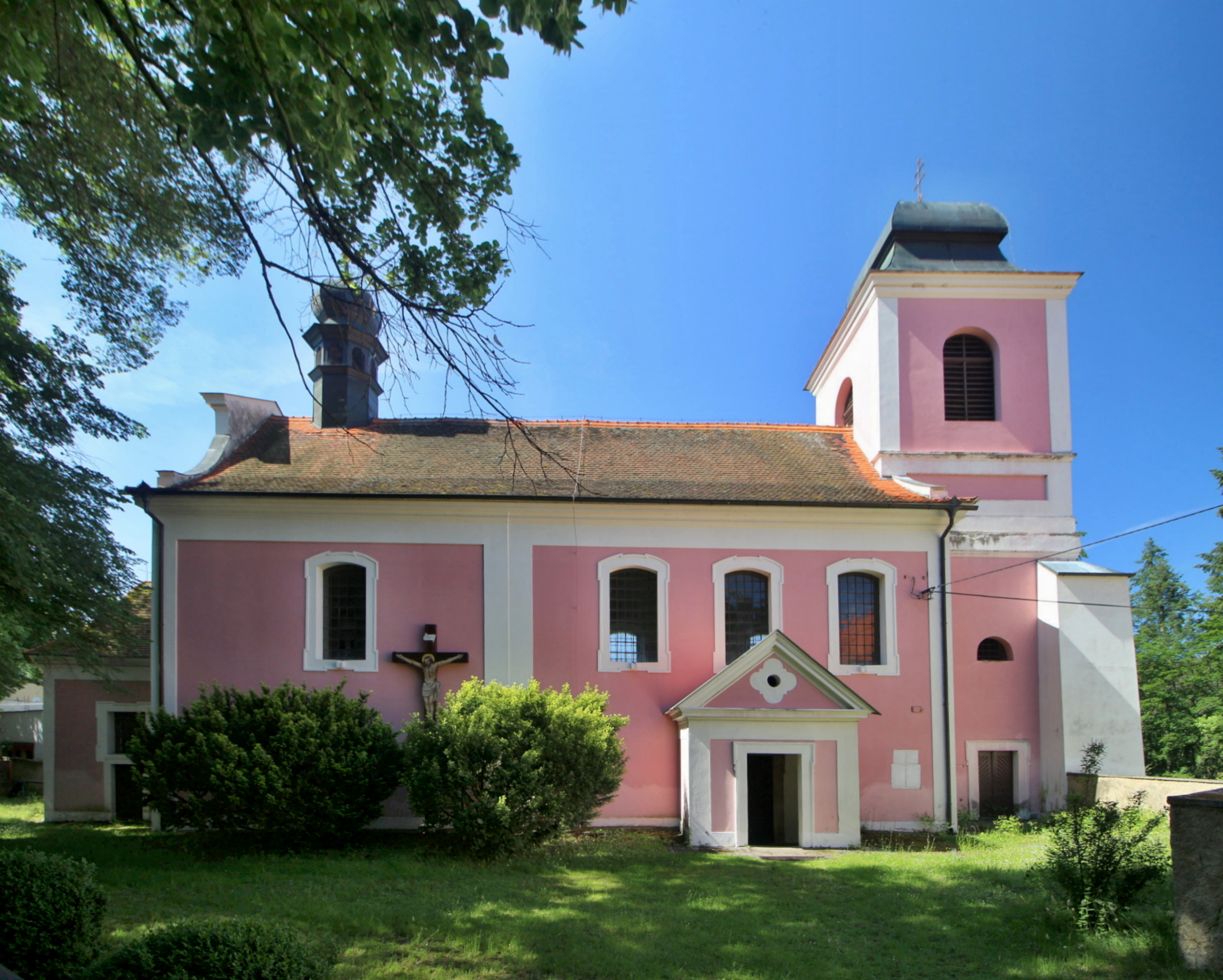 Zbečno kostel sv. Matina